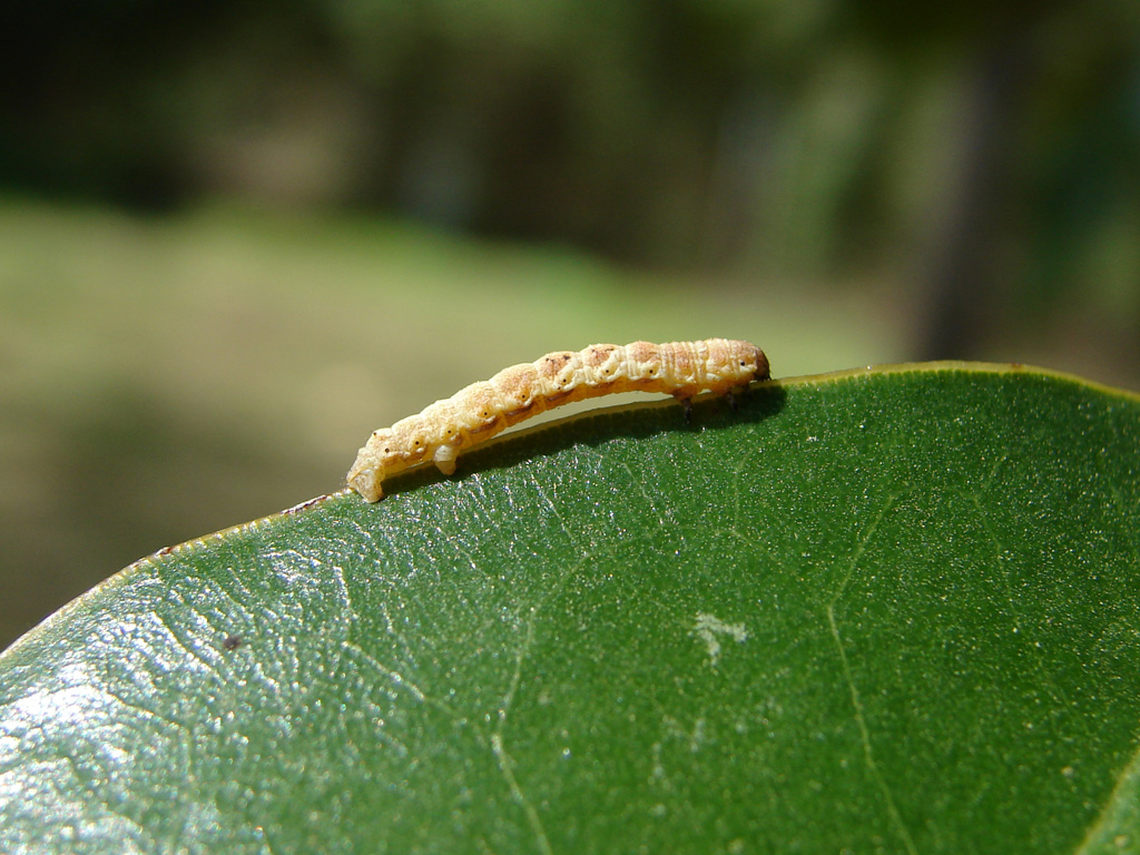 A geometrid caterpillar